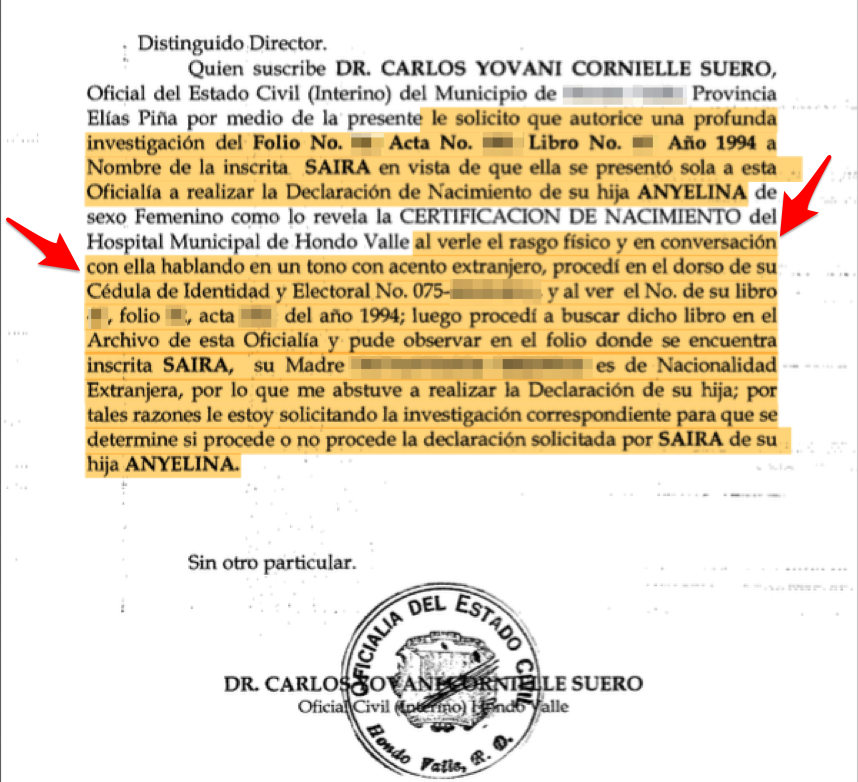 Ejemplo discriminación informes inspectoría JCE